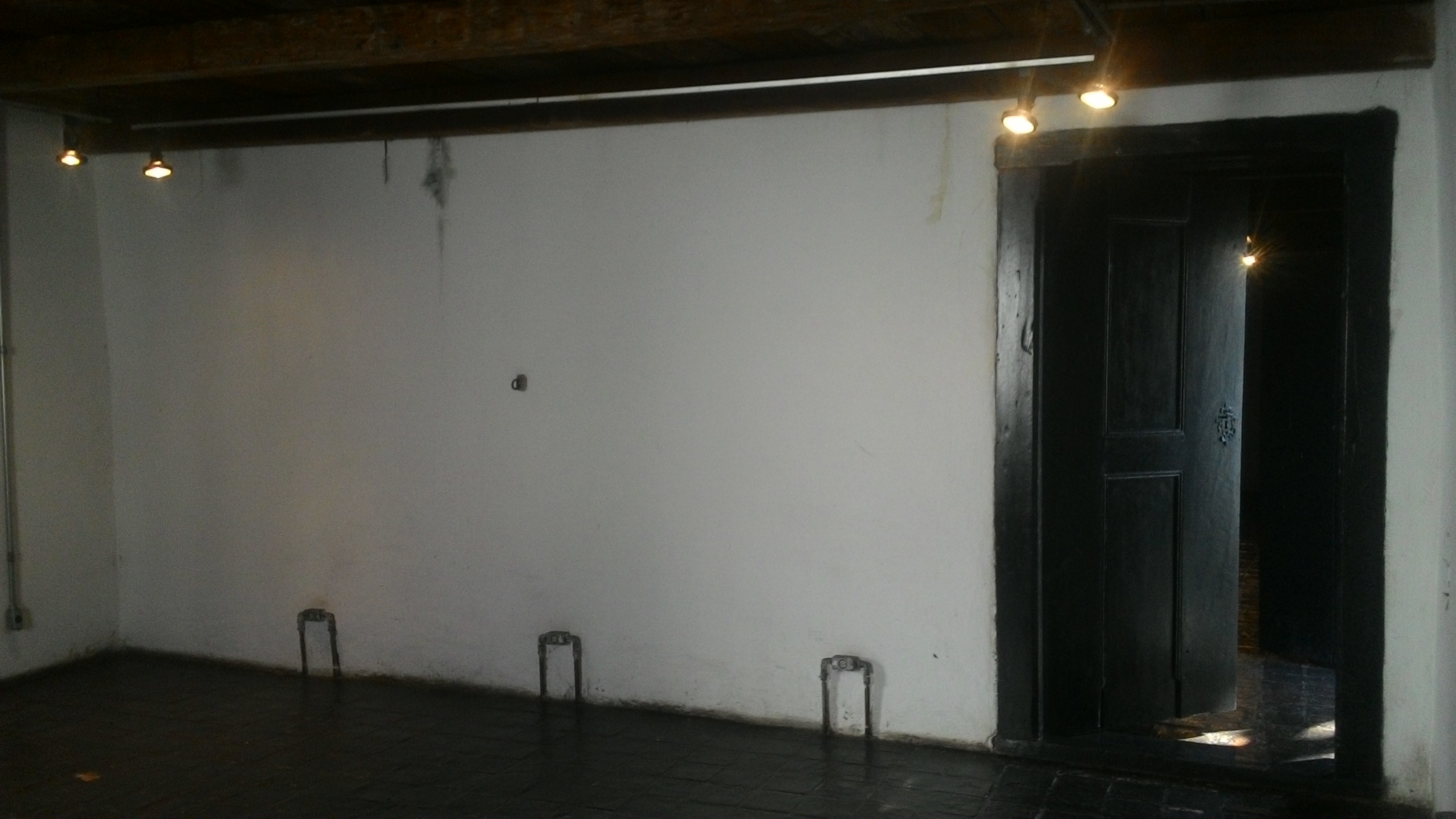 Cômodo da Casa do Sítio Tatuapé, em São Paulo (SP), Brasil.